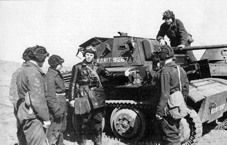 Tank Tetrarch MkVII v roce 1942 v Zakavkazsku